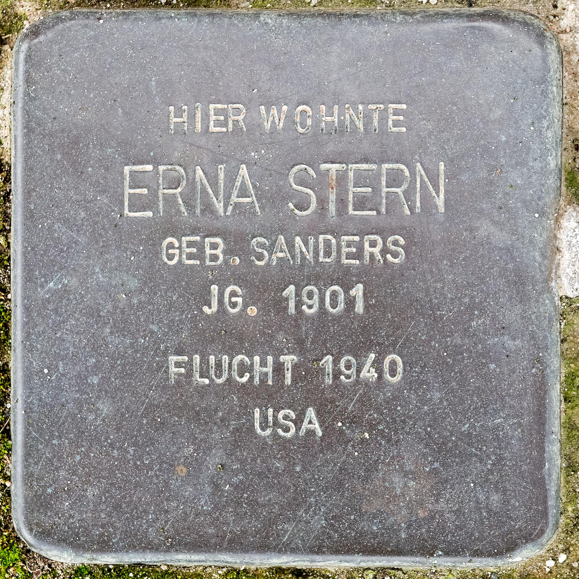 Stolperstein Stern, Erna